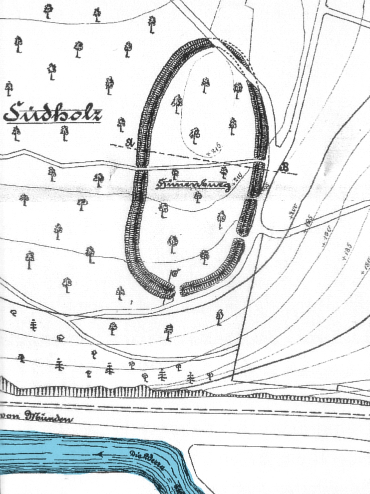 Burgwall Hedemünden